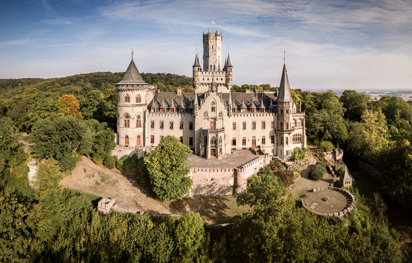 Schloss Marienburg bei Pattensen.